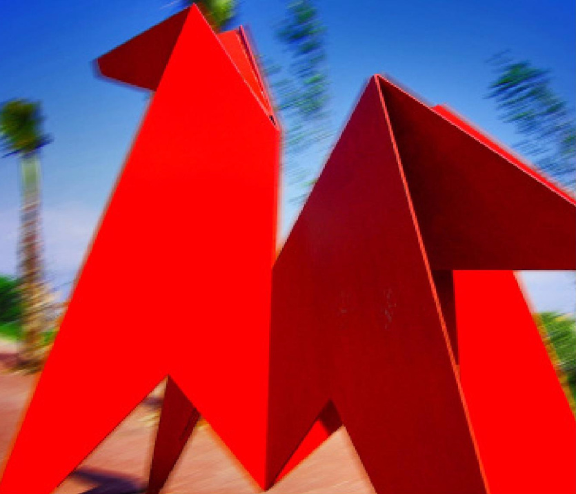 "Cavall Vermell" escultura en acer de Daniel Navas i Neus Solé representant un cavall de paper plegat